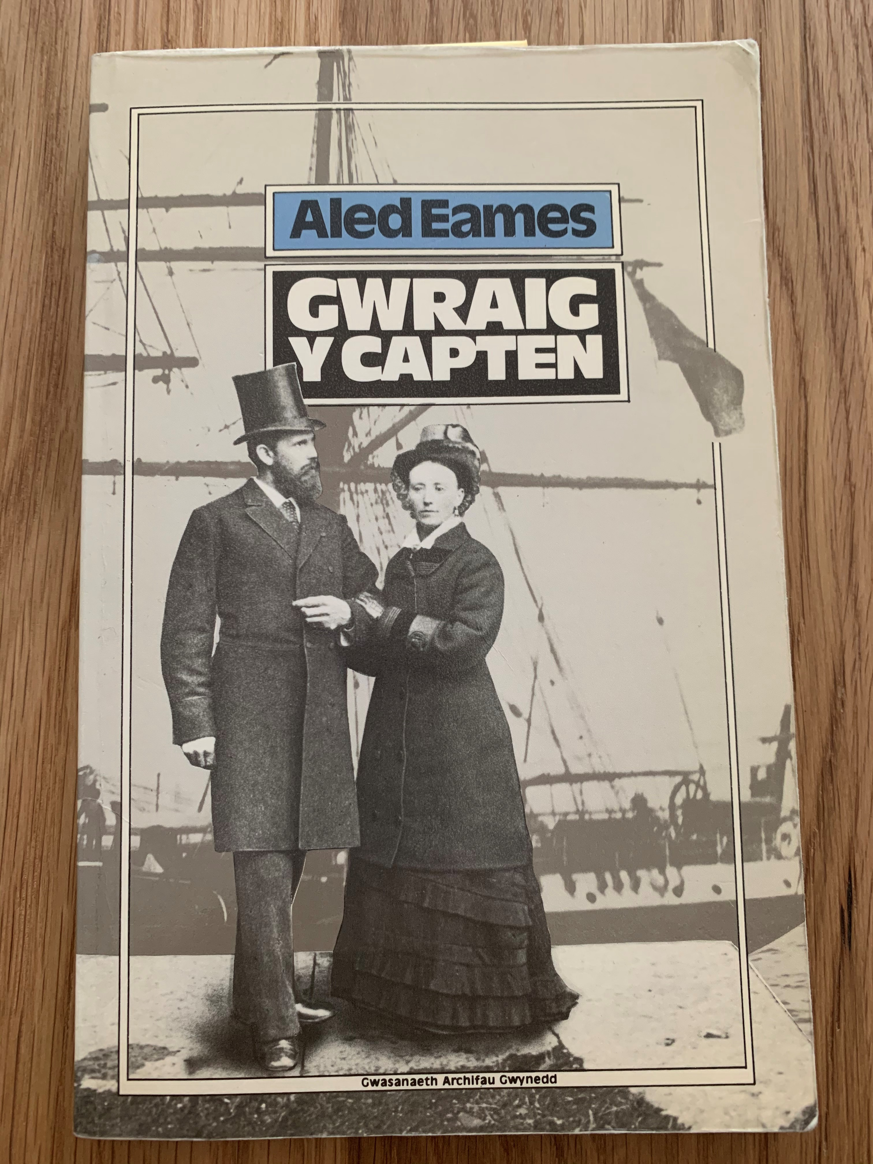 Llyfr Aled Eames 'Gwraig y Capten' yn olrhain hanes dyddiadur Ellen Owen o Dudweiliog ar ei mordaith adref o San Francisco.